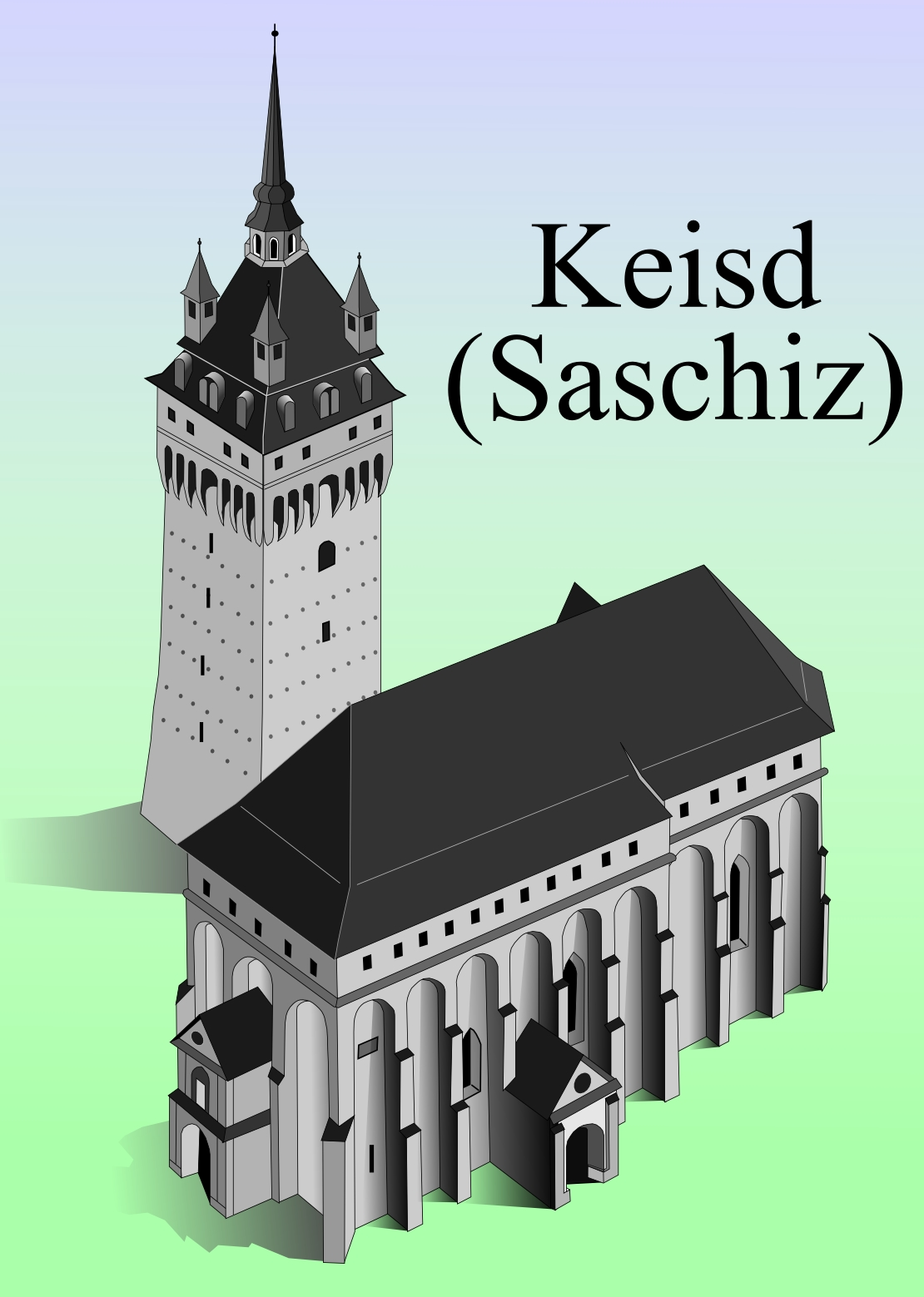 Biserica fortificata din Saschiz.